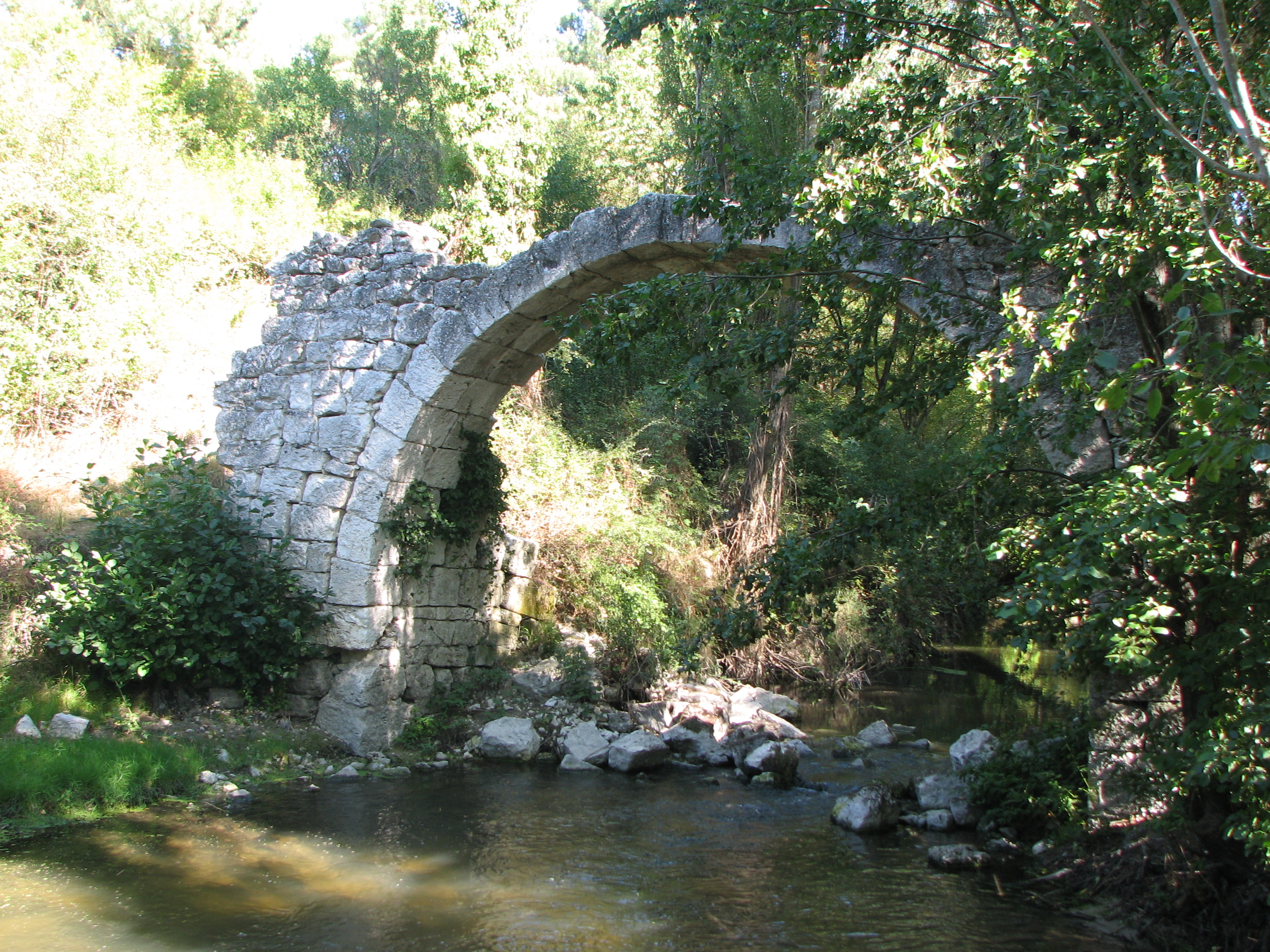 Puente de Barrancales, en término de Cuéllar, que atraviesa el río Cega. Foto de su estado en 2008, antes de su restauración.